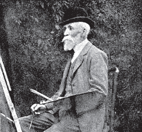 Serafín Avendaño (–1916) Alternative names Serafin de Avendano • Serafín de AvendañoSerafín Xoaquín Avendaño Martínez • Serafín Joaquín Avendaño MartínezDescription painterDate of birth/death 12 October 1838 / 2 August 1837 23 August 1916Location of birth/death Vigo, Spain Valladolid, SpainWork location NetherlandsAuthority control : Q3394913 VIAF: 95900094 ISNI: 0000 0001 1690 5427 ULAN: 500035250 GND: 124424627 BNE: XX842262 creator QS:P170,Q3394913